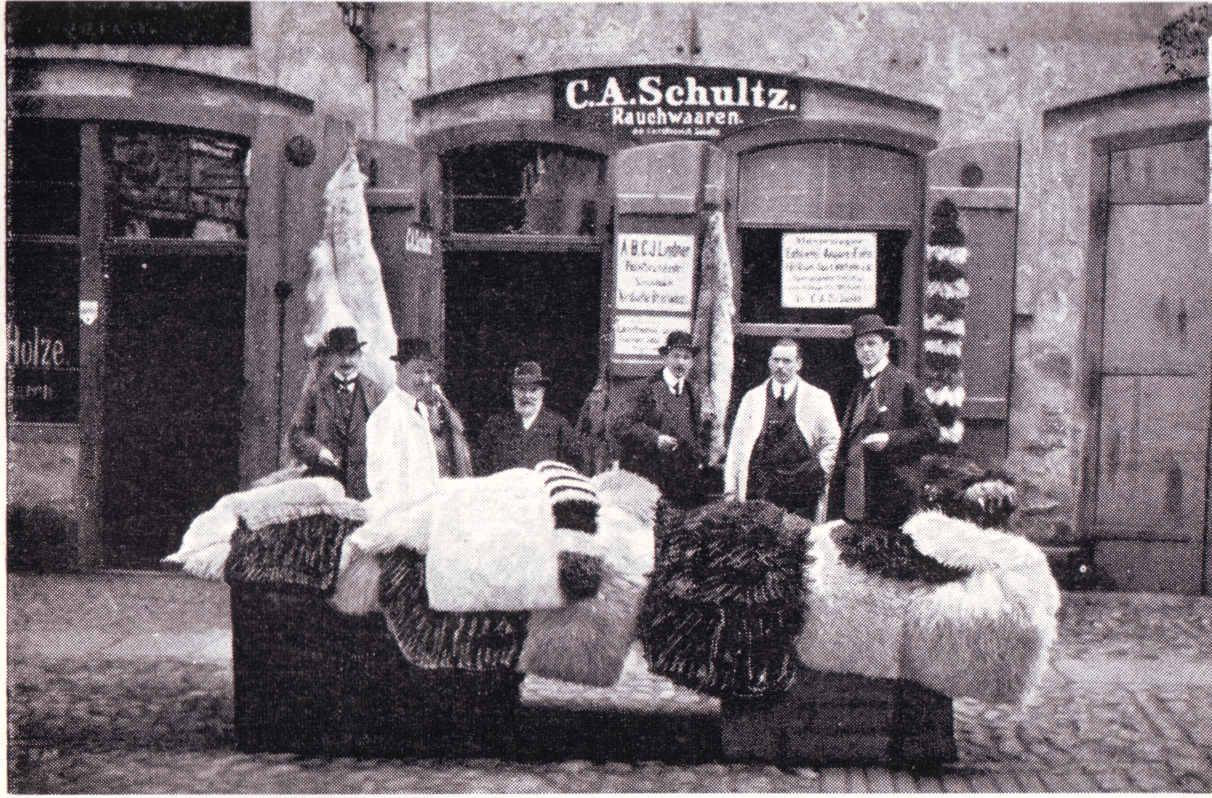 Rauchwaaren C. A. Schultz (Carl August Schultz), Brühl 45, zur Zeit der Oster-Pelzmesse 1905 in Leipzig Gegründet 1840 von Johann Gottlieb Schultz, feierte das Pelzhaus Schultz 1965 sein 125jähriges Bestehen. 1971 Übergabe des Gründungsbetriebs in Posen an den Bruder Hermann, bald darauf siedelte Carl August nach Leipzig über. Nachfolge durch den der Sohn, der Kürschner Benno Schultz, der 1899 die Leitung des Posener Betriebs übernahm, den er drei Jahre später käuflich erwarb und bis nach dem Zweiten Weltkrieg erhielt. Erst die beiden Söhne mussten die Heimat verlassen. Kürschnermeister Hans Schultz eröffnete nach dem Krieg auf der Niddastraße 54 in Frankfurt am Main ein Unternehmen mit Pelzkonfektion und Rauchwarenhandel. Carlheinz Schultz eröffnete in München auf der Kaufinger Straße 10 ein Detailgeschäft für feine Pelzwaren. Beide Betriebe bestanden noch 1965. Quelle: Die Pelzwirtschaft, 1. Januar 1965, S. 107